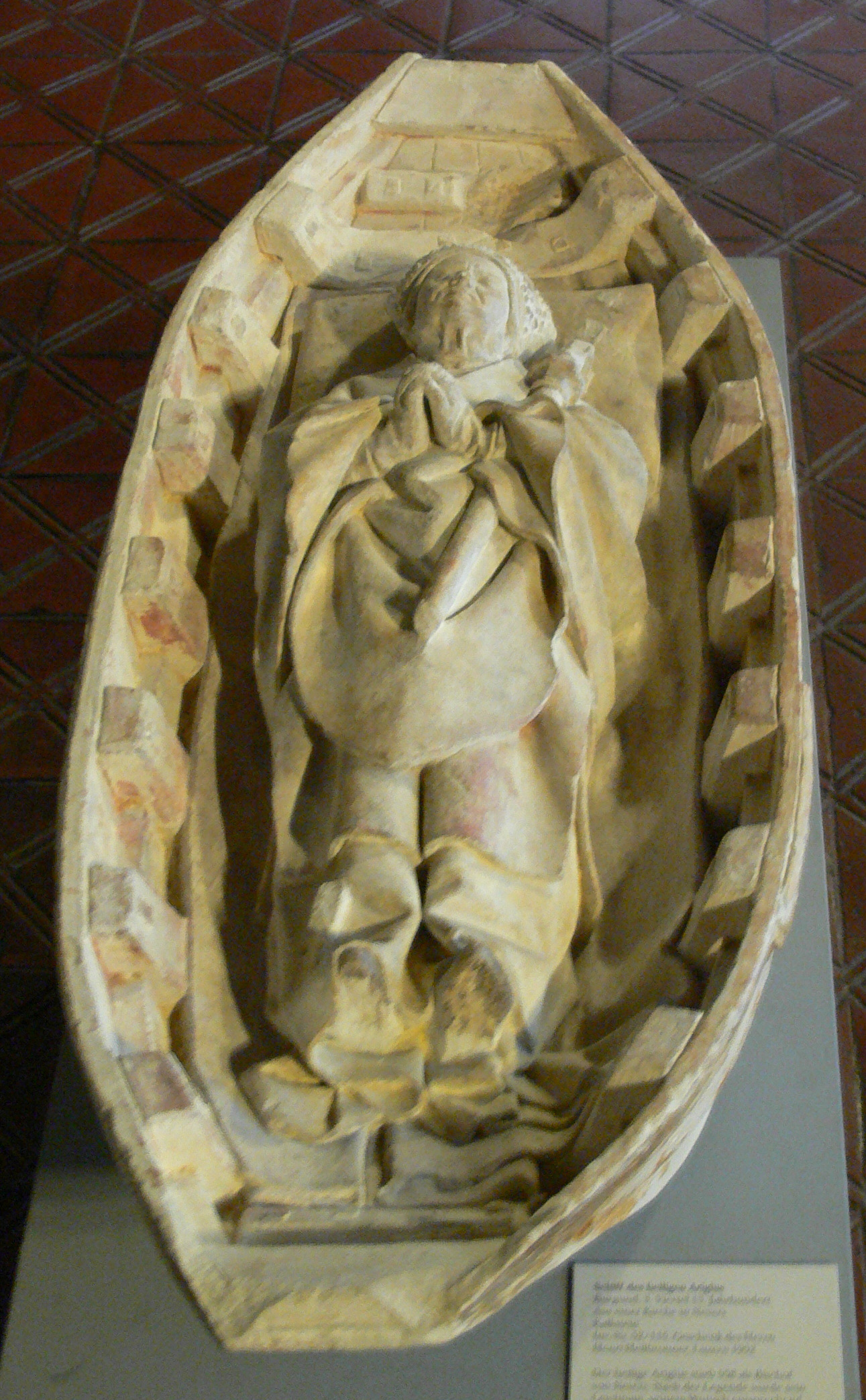 München, Bayerisches Nationalmuseum: Totenschiff des hl. Arigius von Nevers, Burgund, 15. Jahrhundert